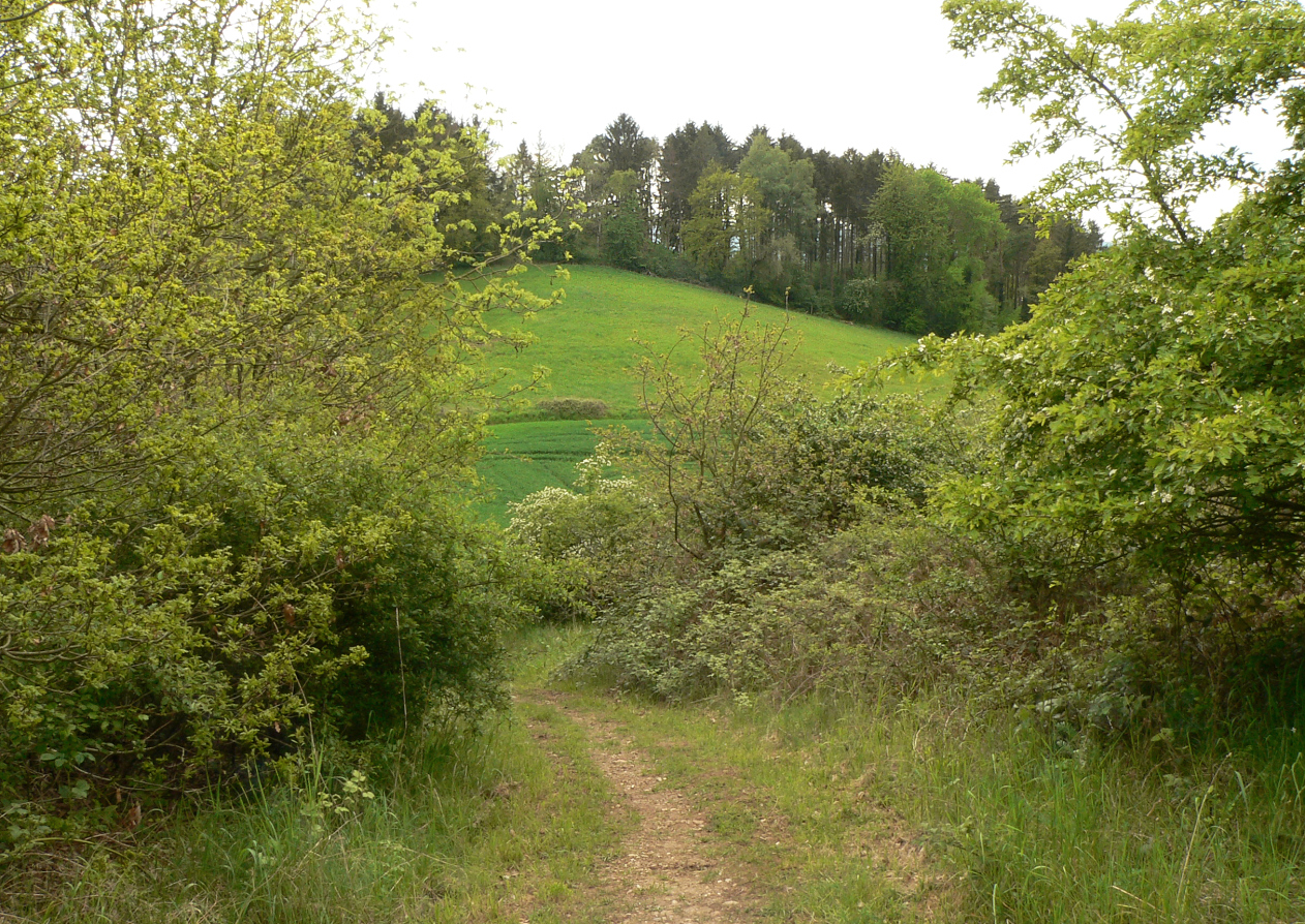 Landschaftsschutzgebiet und Geotop Dütberg, Nebenkuppe